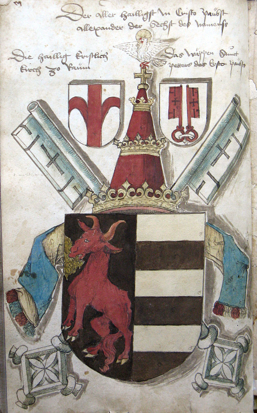 Wappen des Papsts Alexander VI. (aus dem Haus Borgia), aus: JÖRG RUGEN: WAPPENBUCH, Pap. I, 317, I* Bl. 320x215. Bayern, um 1495/98, Innsbruck, Universitätsbibliothek, Cod. 545, Bl. 16v